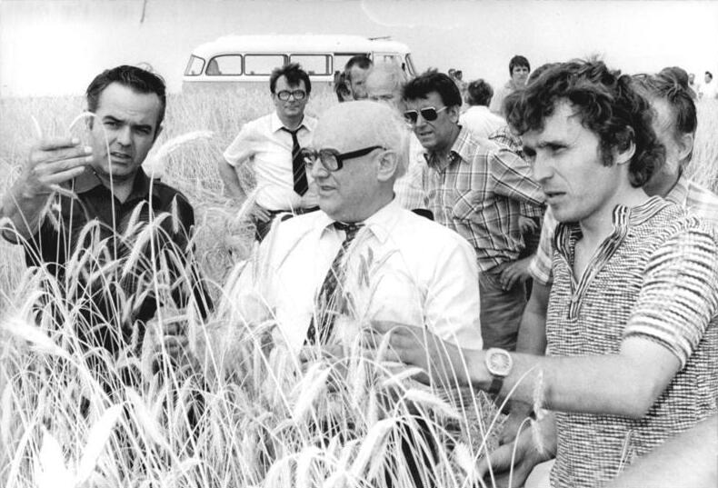 LPG Dahme, Besuch von Bruno Lietz ADN-ZB Weisflog 6.7.83 Bez. Cottbus: Beginn der Getreideernte-Auf leichten Standorten im Flachland hat die Getreidemahd begonnen. Auf Feldern der LPG Pflanzenproduktion Dahme im Kreis Luckau informierte sich Bruno Lietz (M.), Minister für Land-, Forst- und Nahrungsgüterwirtschaft, über den Ablauf der Getreideernte.